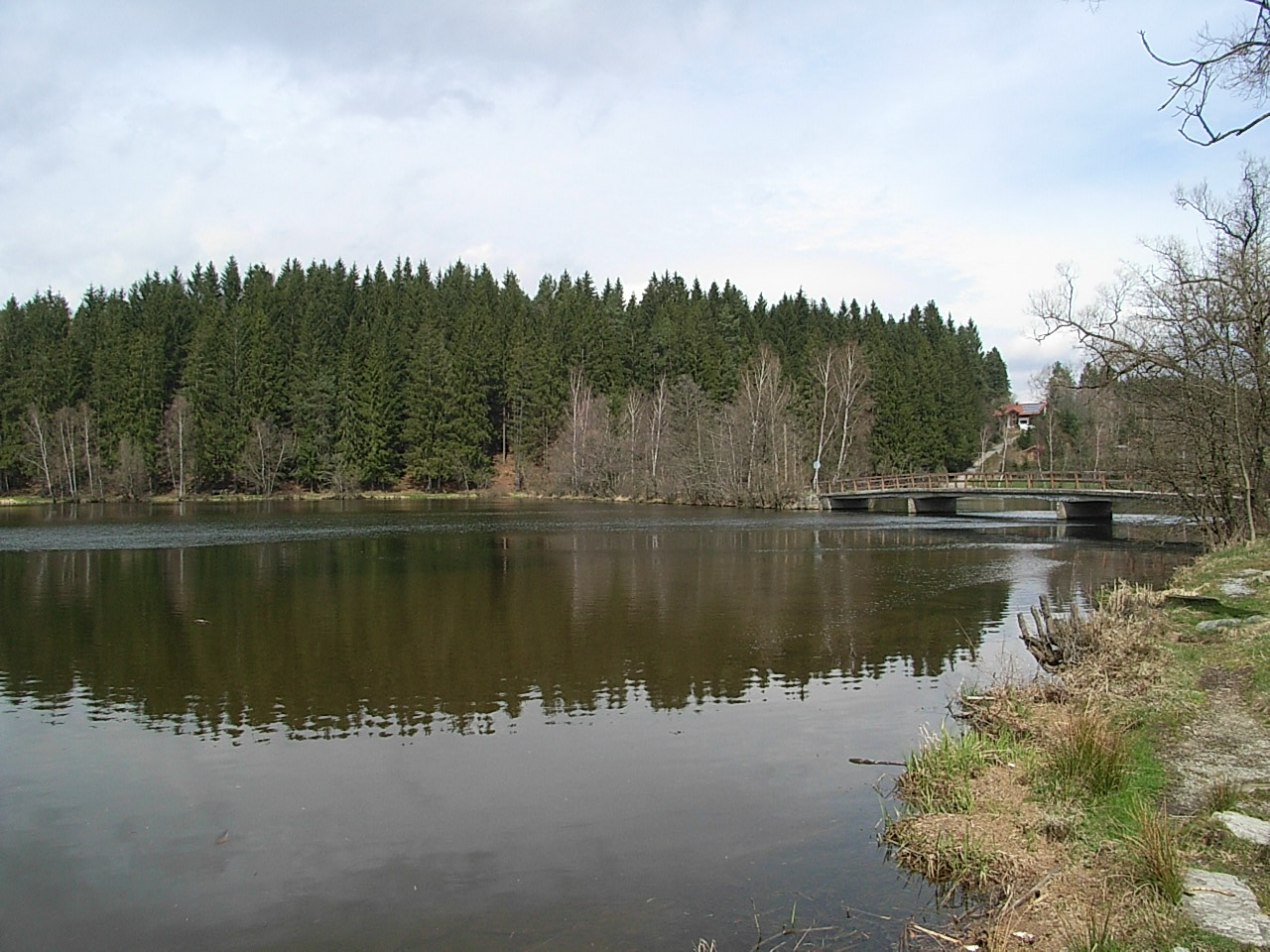 Am Regener See